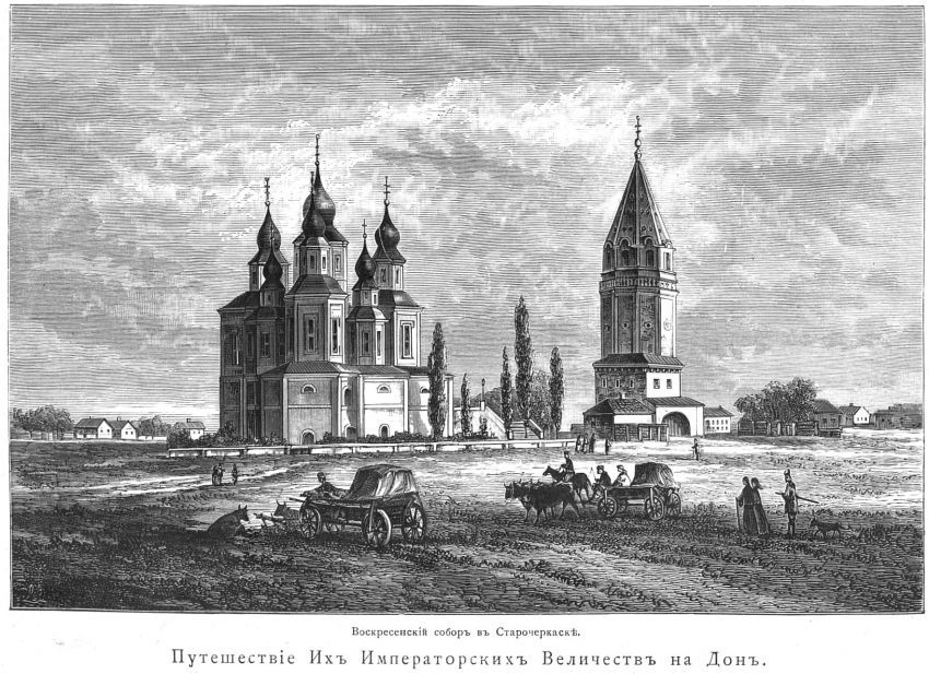 Старочеркасская. Собор Воскресения христова